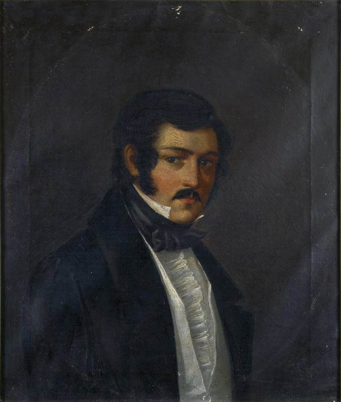 Беларуская (тарашкевіца): Партрэт Людвіка Нарбута (Ludvik Narbut)